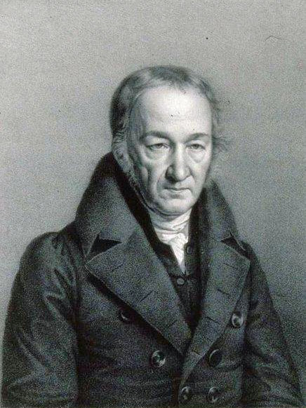 Louis Herrenschneider, Professeur à la Faculté des Sciences et au Séminaire protestant de Strasbourg, né le 23 mars 1760. 1838. Bibliothèque nationale et universitaire de Strasbourg